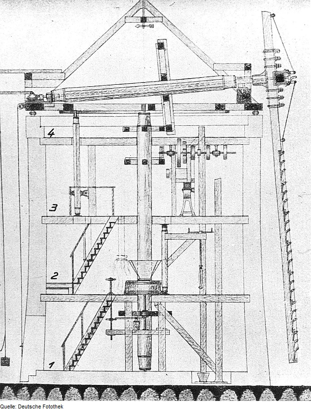 Original image description from the Deutsche Fotothek Syrau. Turmholländer, Baujahr 1887, Querschnitt, aus: Mitteilungen des Landesvereins sächsischer Heimatschutz, Bd. 15, 1926